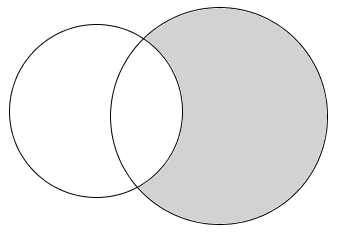 Lúnula